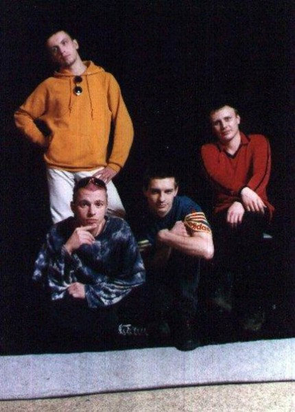 Российская рок-группа «Пилот», 1998 год.